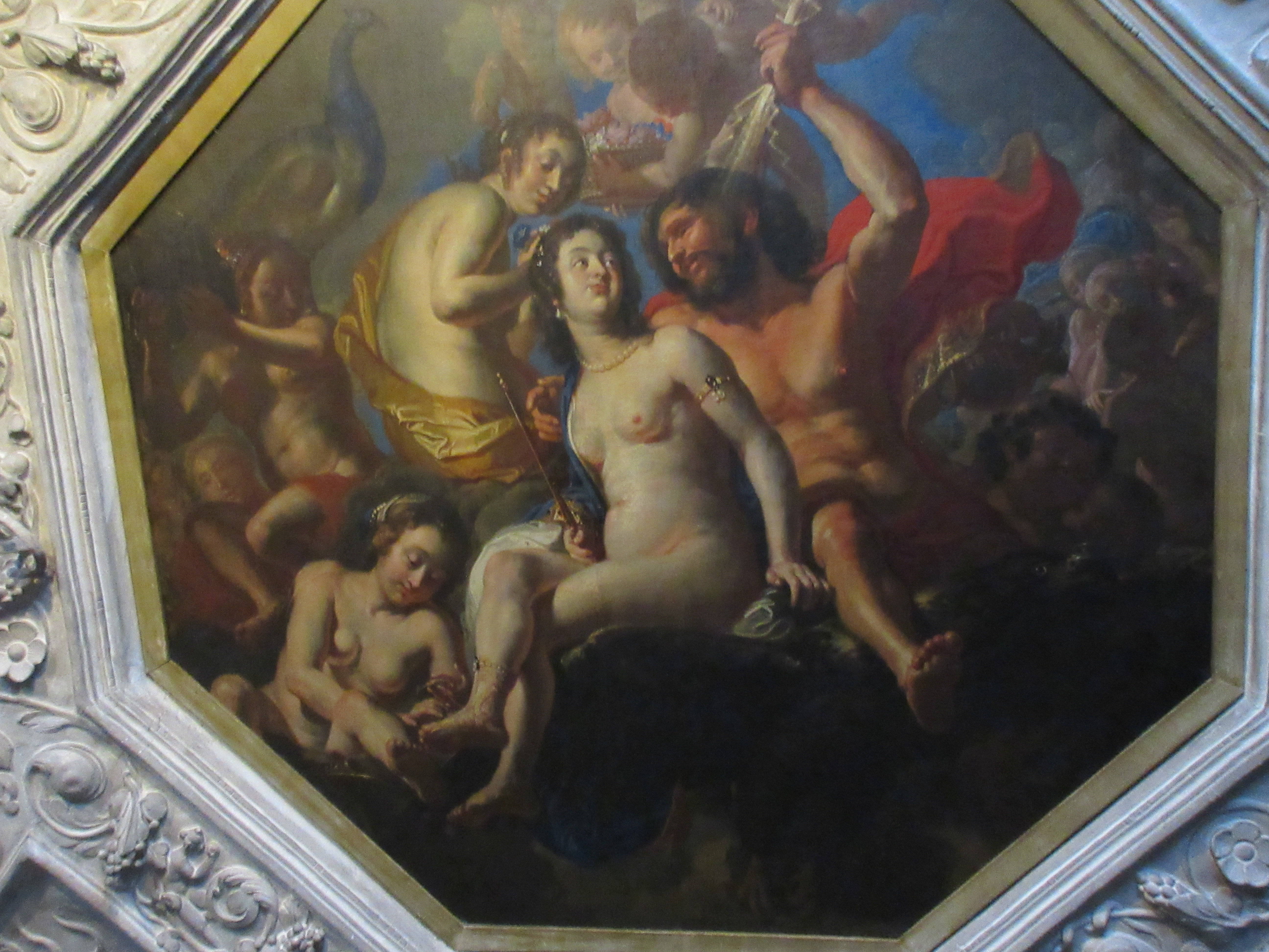 Abraham Wuchters har begået dette loftsmaleri på Rosenborg Slot engang i 1660'erne. Motivet er "Hera og Zeus på Olympen" og af portrætligheden at skønne formodes det, at Frederik 3.'s dronning Sophie Amalie har siddet model til Hera.